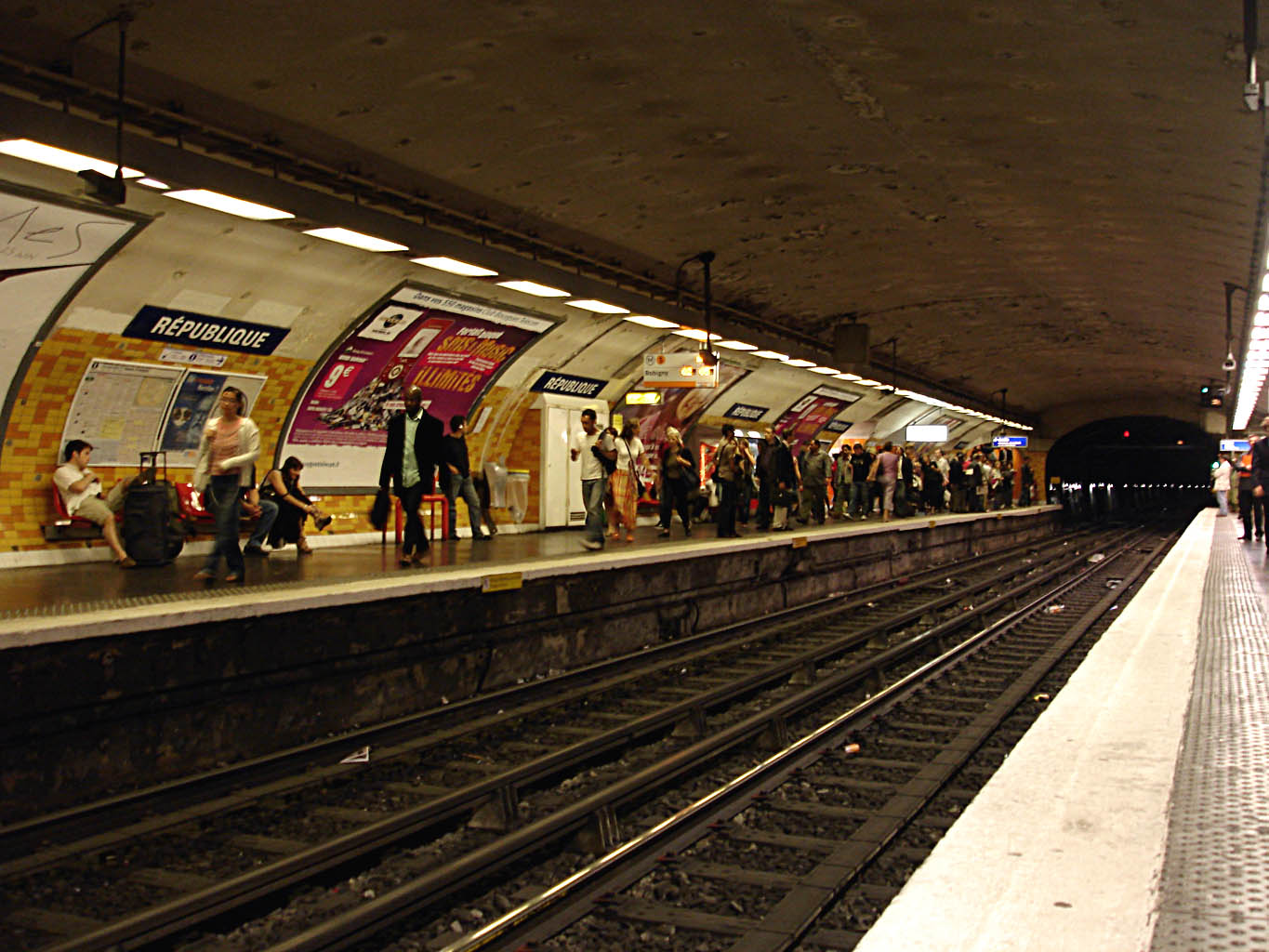 La station République de la ligne 5 du métro de Paris, France